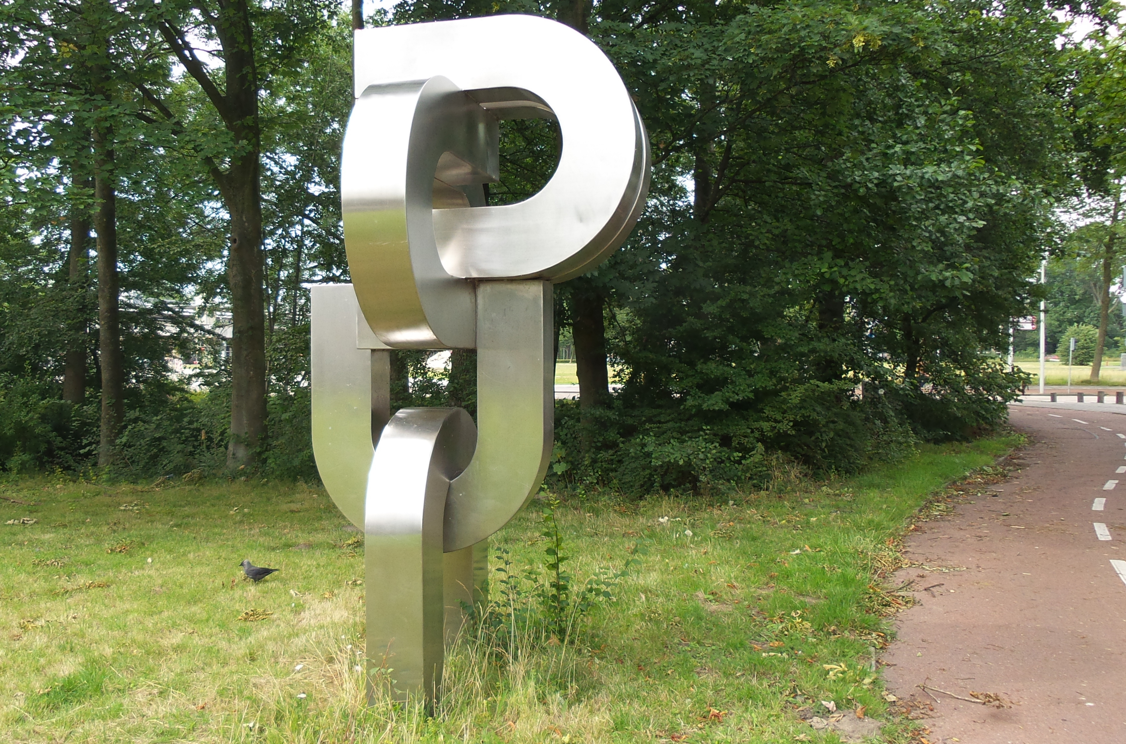 In elkaar hakende magneten van RVS gemaakt door Lies Maes en gemaakt in 1974, staat nu in de Wittgensteinlaan in Amsterdam Slotervaart.